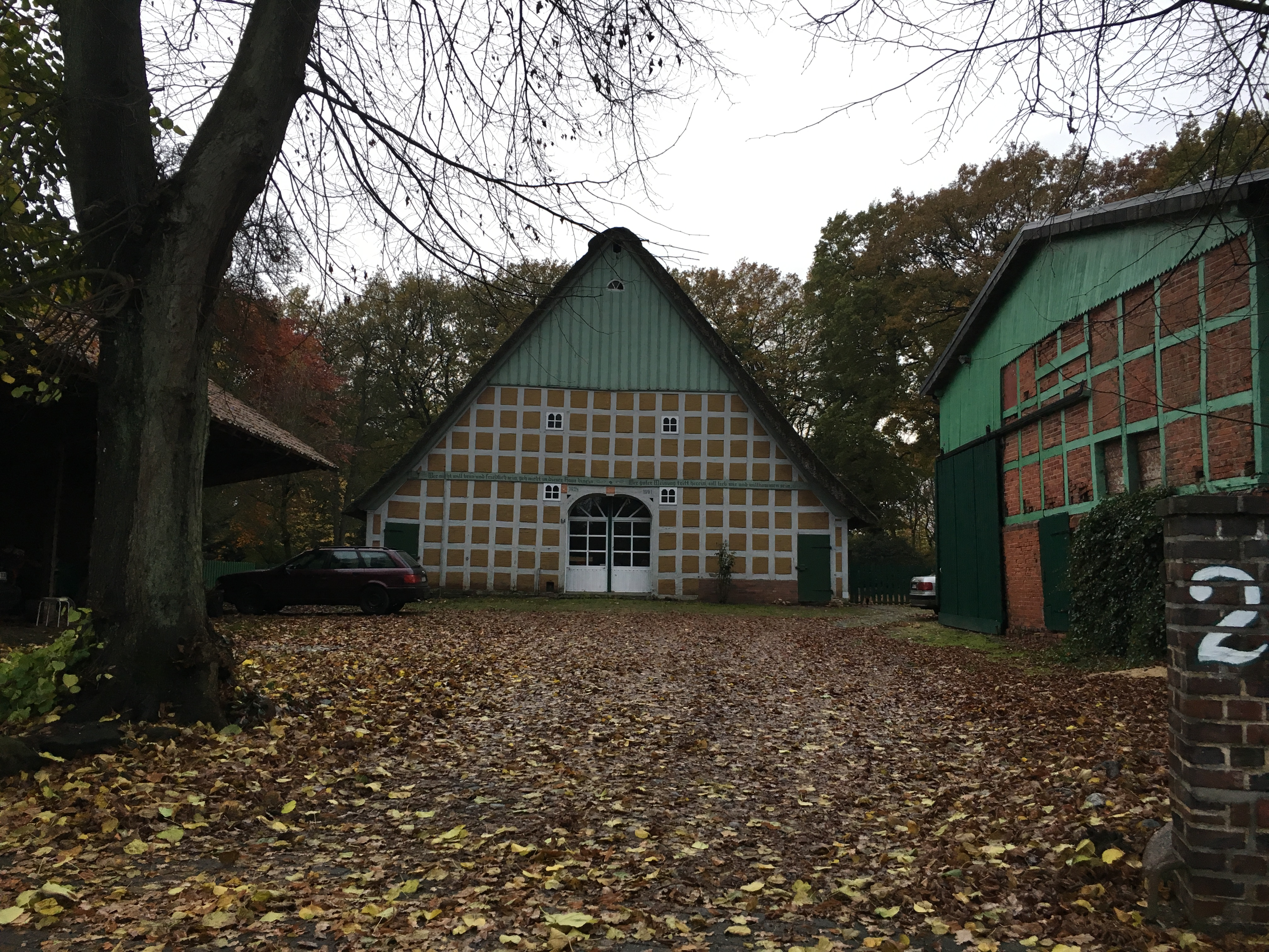 Buurnhoff in Eversdörp, Landkreis Rodenborg